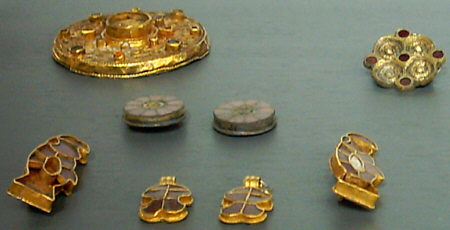 Augsburg (Bayern): Alamannisch/bajuwarischer Schmuck im Römischen Museum. Oben: Scheibenfibeln aus dem 7. Jahrhundert Unten: Adler oder Vogelfibeln mit Almandingeinlagen aus dem 6. Jahrhundert